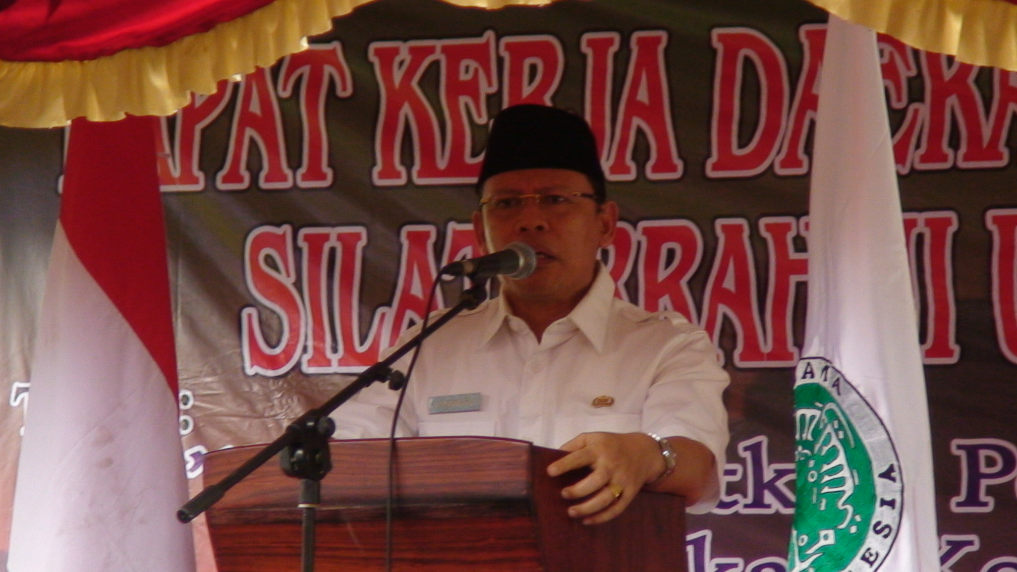 Bupati Kapuas memberikan sambutan pada Rapat Kerja Daerah MUI Kabupaten Kapuas Tahun 2010